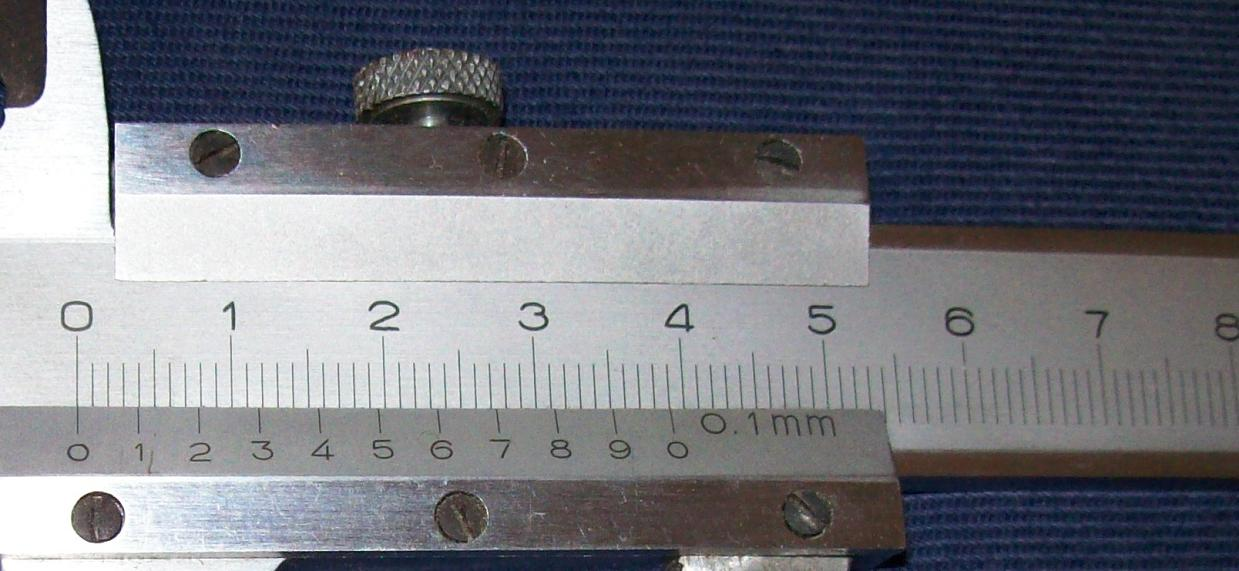 Messschieber / vernier caliper